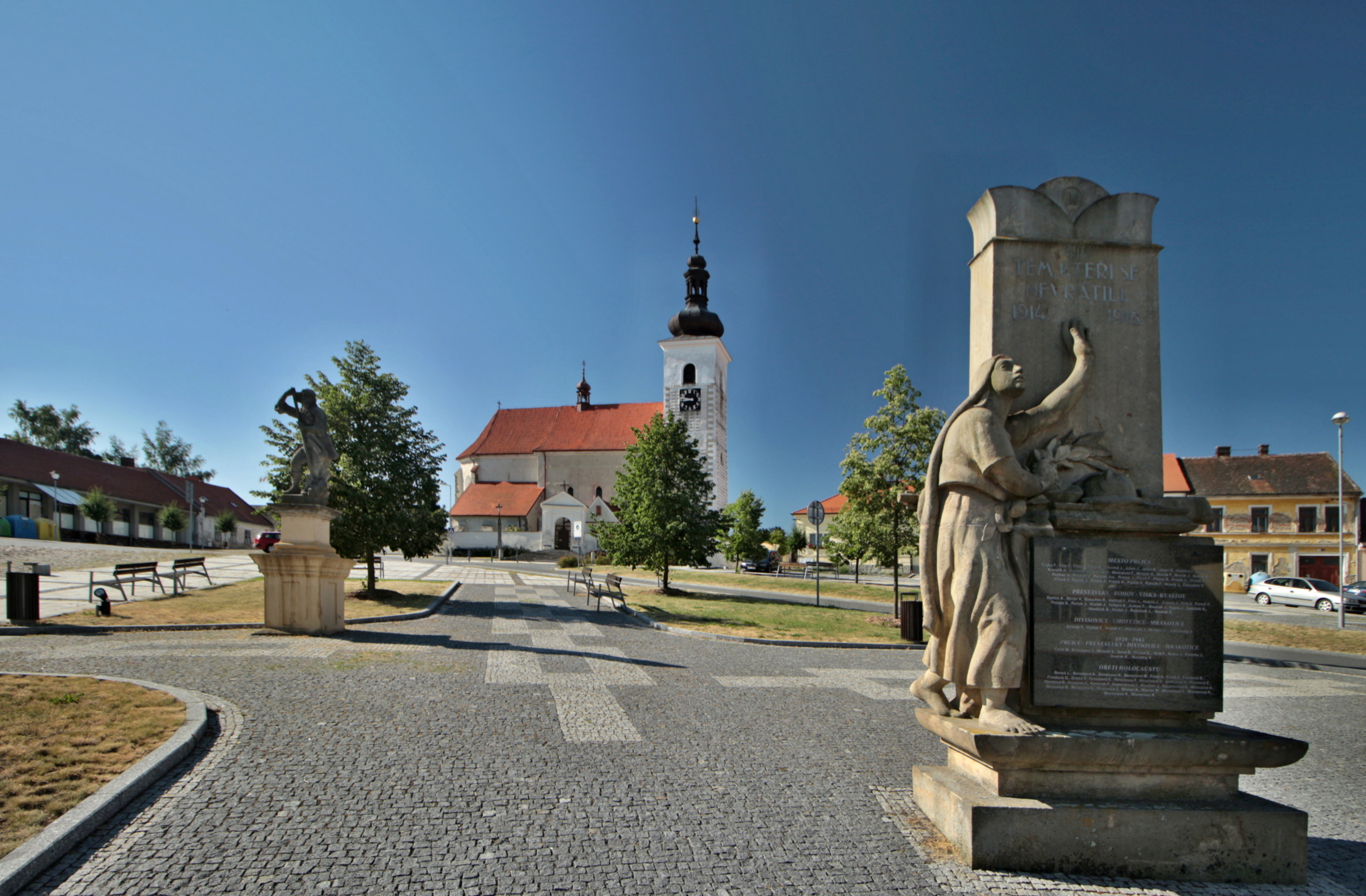 Sedlec-Prčice, Vítkovo náměstí v Prčici